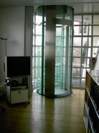 runder Glasaufzug